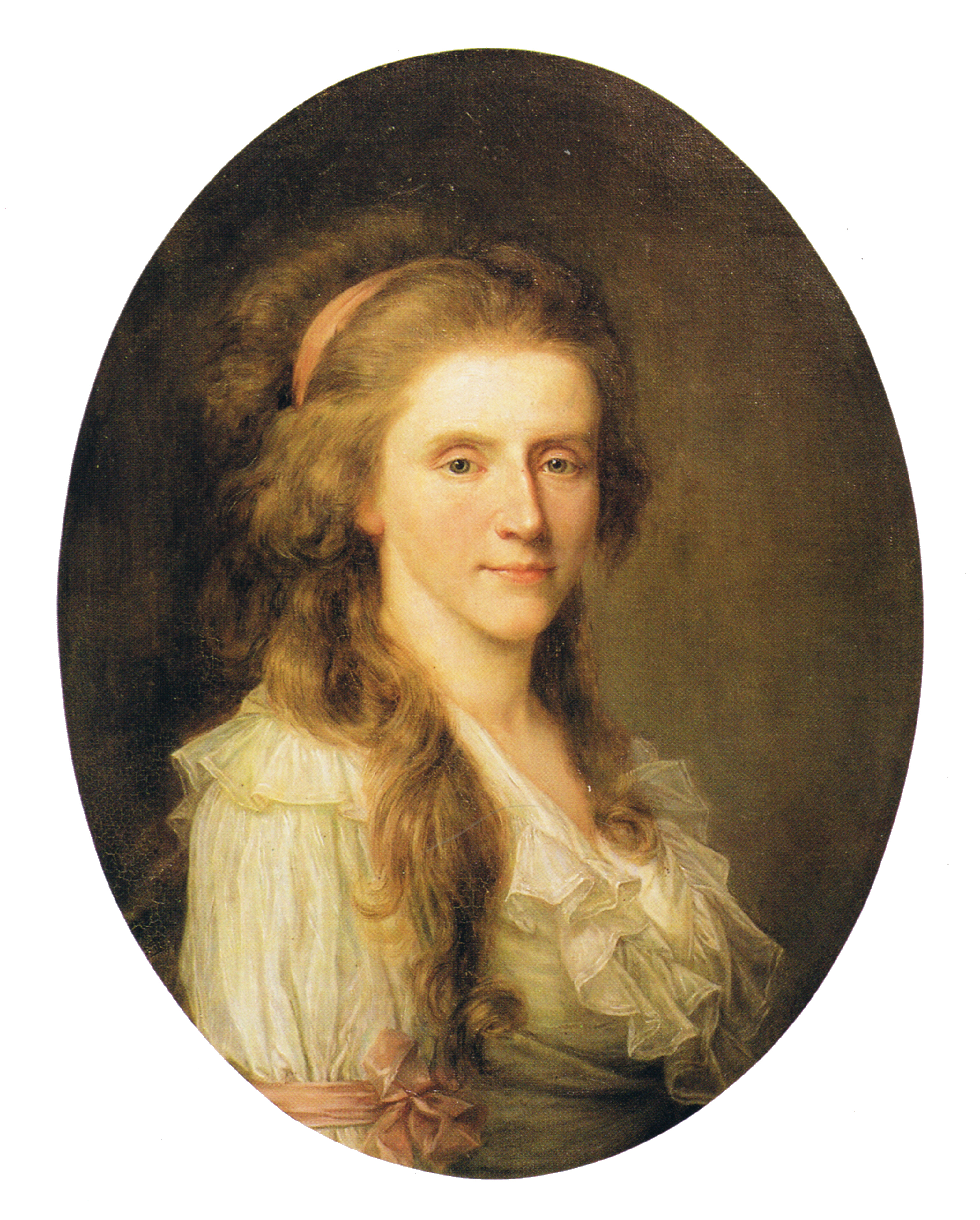 Auguste Gräfin zu Stolberg (1753-1835), seit 1783 verheiratet mit dem Andreas Peter Graf Bernstorff. Ölgemälde von Jens Juel. Diese Schwester der Goethe befreundeten Grafen Stolberg wandte sich, vom "Werther" ergriffen, an den Dichter, der ihr, ohne dass beide sich je sahen, die für sein Inneres aufschlussreichsten Briefe (bis 1782) schrieb. Ihren Bekehrungsversuch beantwortete Goethe mit einem seiner herrlichsten Briefe. Sie wurde durch ihren regen Briefwechsel mit dem Dichter und Denker Johann Wolfgang von Goethe bekannt und ging als Goethes Gustchen in die Literaturgeschichte ein.